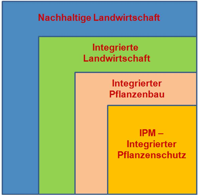 Rolle von Integriertem Pflanzenschutz, Integriertem Pflanzenbau und Integrierter Landwirtschaft im Kontext der nachhaltigen Landwirtschaft